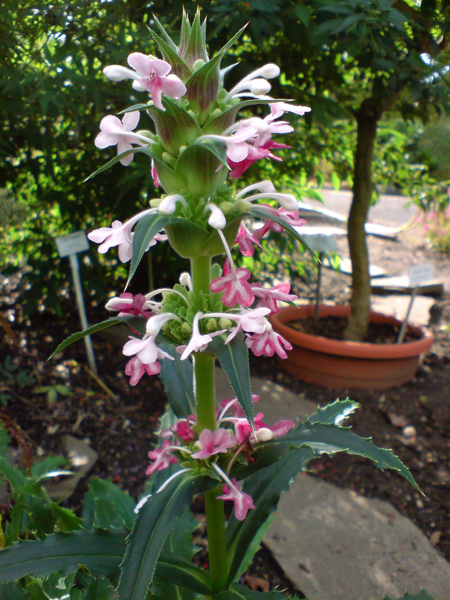 Morina nepalensis - Botanischer Garten Leipzig